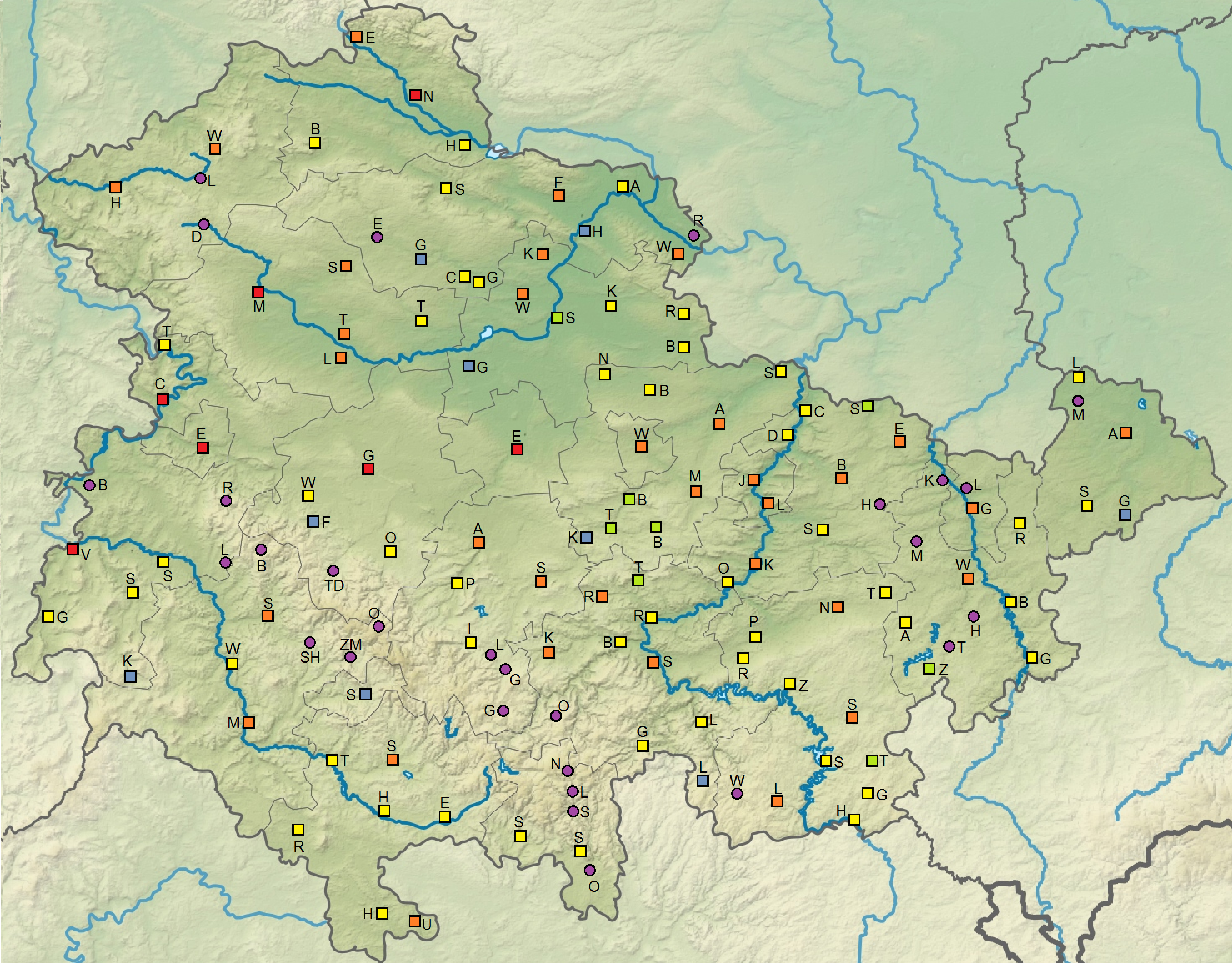 Karte der Städte in Thüringen nach Jahr der Stadtrechtsverleihung. Rot: 12. Jahrhundert, Orange: 13. Jahrhundert, Gelb: 14. Jahrhundert, Grün: 15. Jahrhundert, Blau: 16.-18. Jahrhundert, Lila: nach 1800.